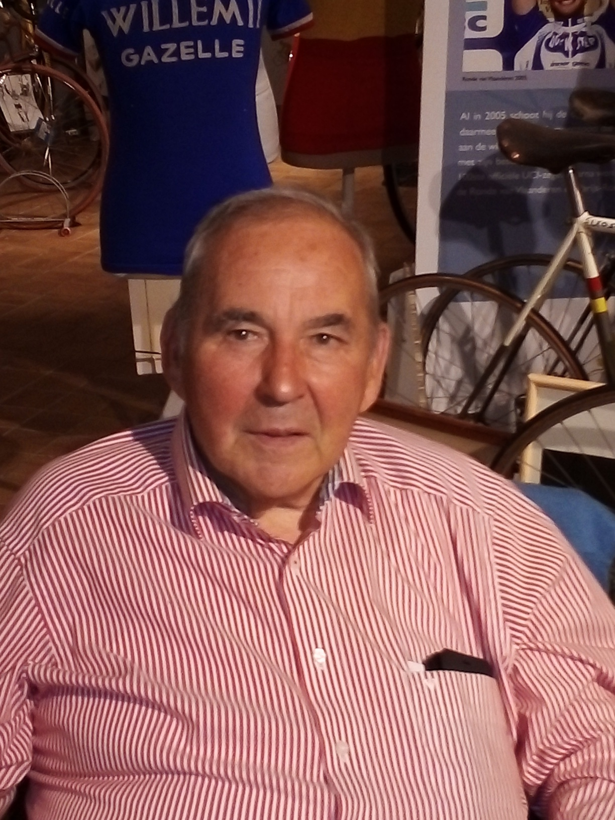 Depicted person: Frans Verhaegen – Belgian bicycle racer